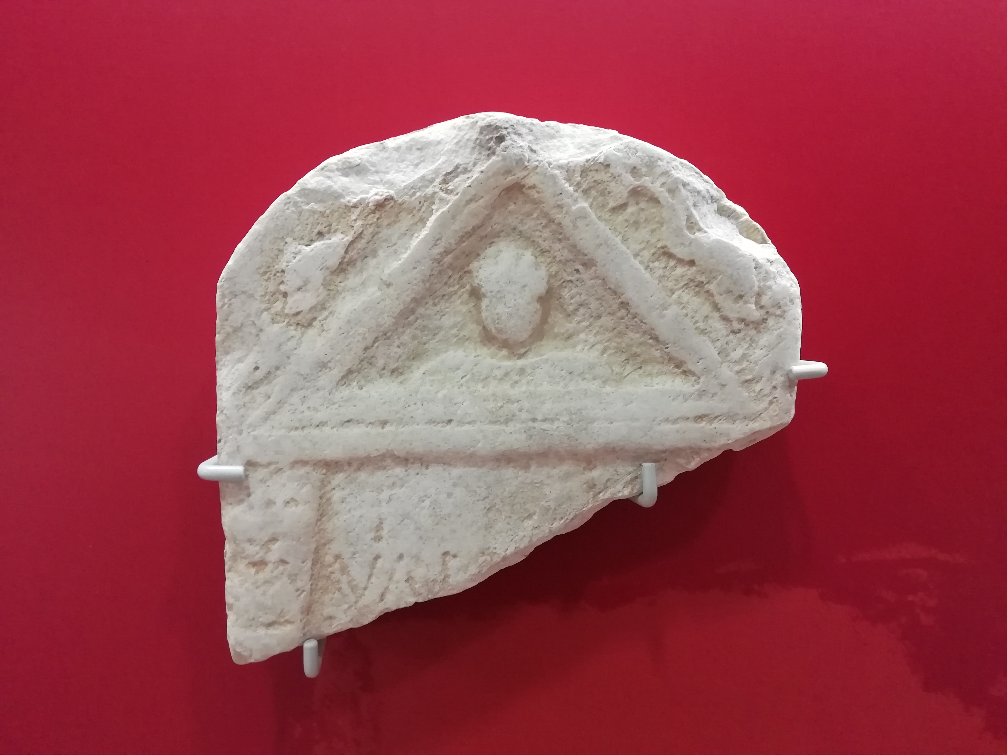 stele funeraria antica roma mac